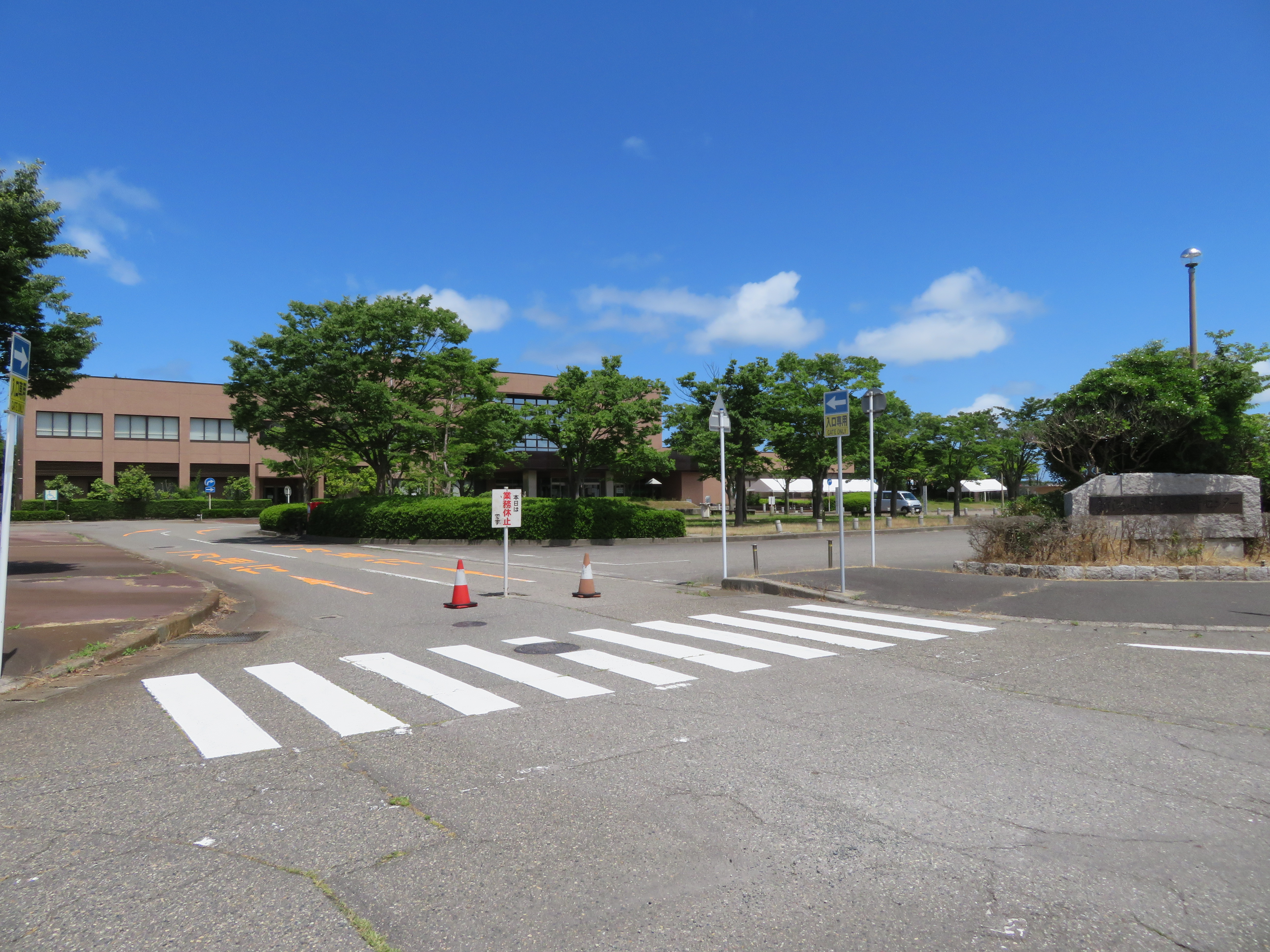 新潟県北蒲原郡聖籠町に所在する新潟県運転免許センター Canon PowerShot SX720 HS